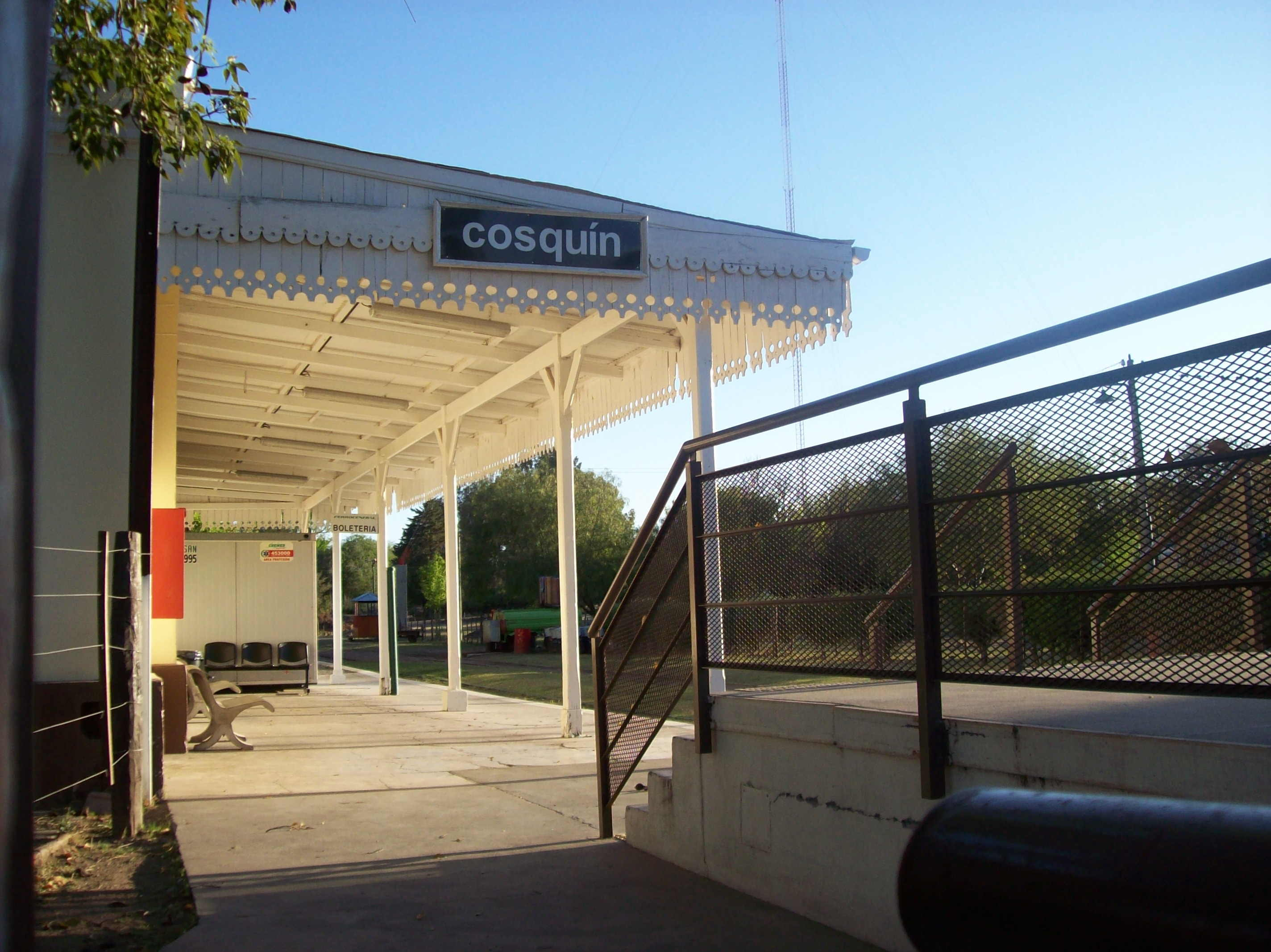 Andén de la Estación Cosquín en la ciudad homónima de la provincia de Córdoba, Argentina.